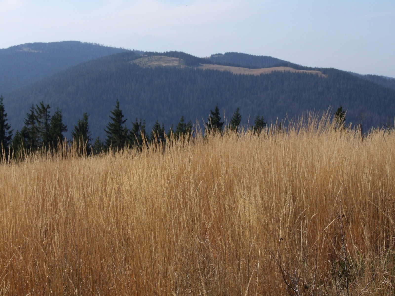 Widok z polany Pustak. W głębi Mostownica, Czoło Turbacza i Turbacz